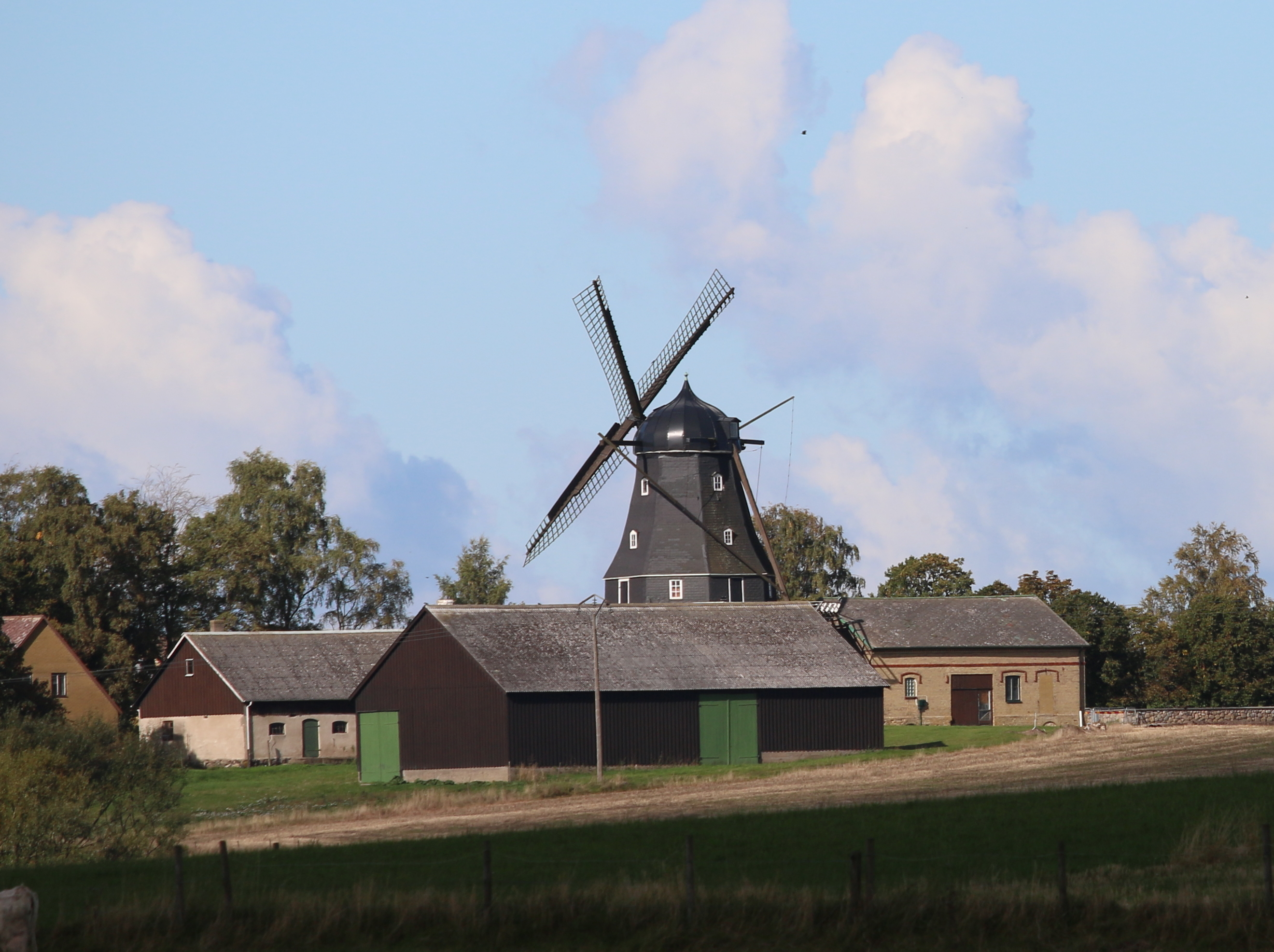 Löddeköpinge mölla